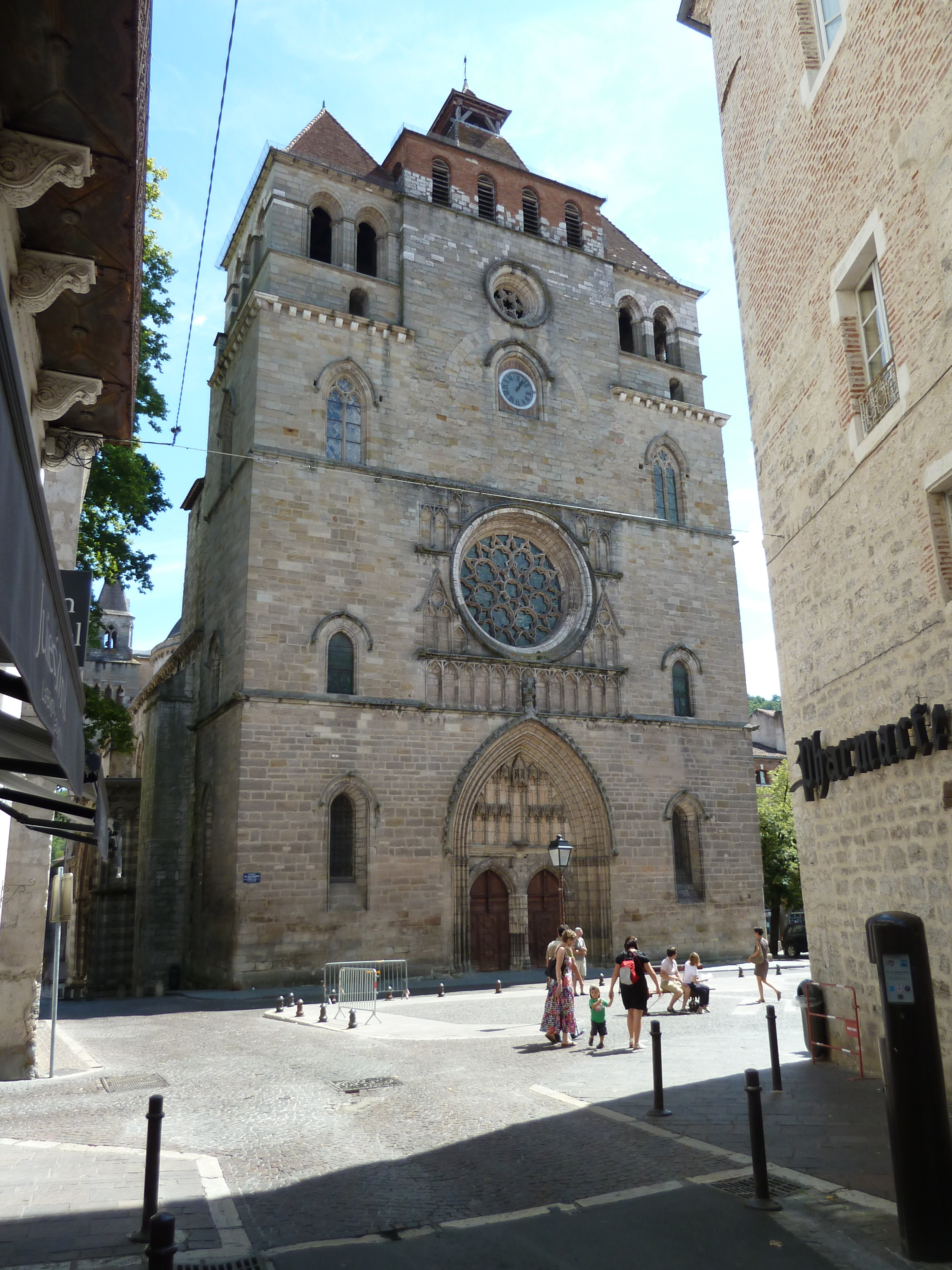 Cathédrale Saint-Étienne de Cahors